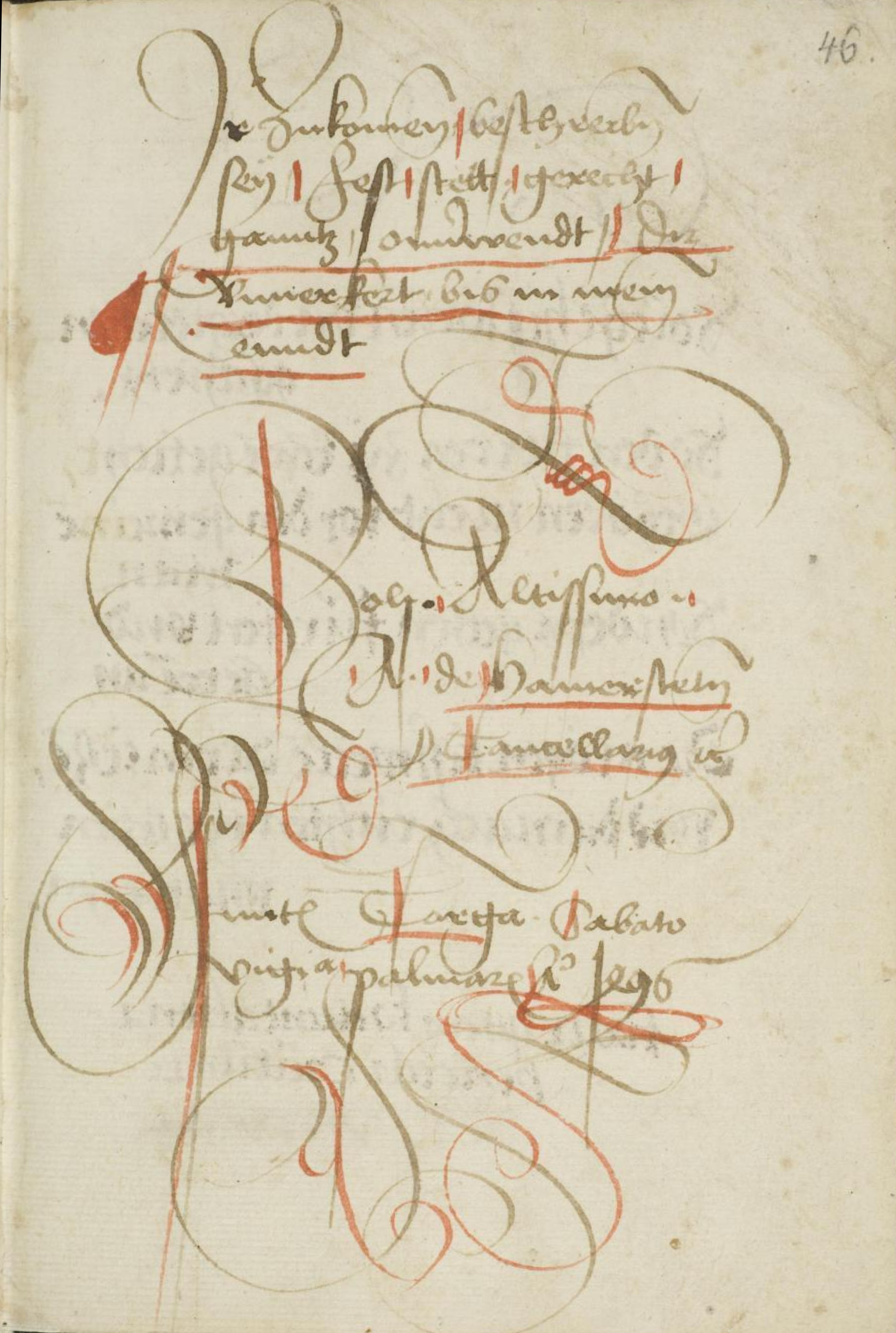 Hystori vom Hirs mit den guldin ghurn Vnd der Fürstin vom pronnen - Mscr.Dresd.M.279.